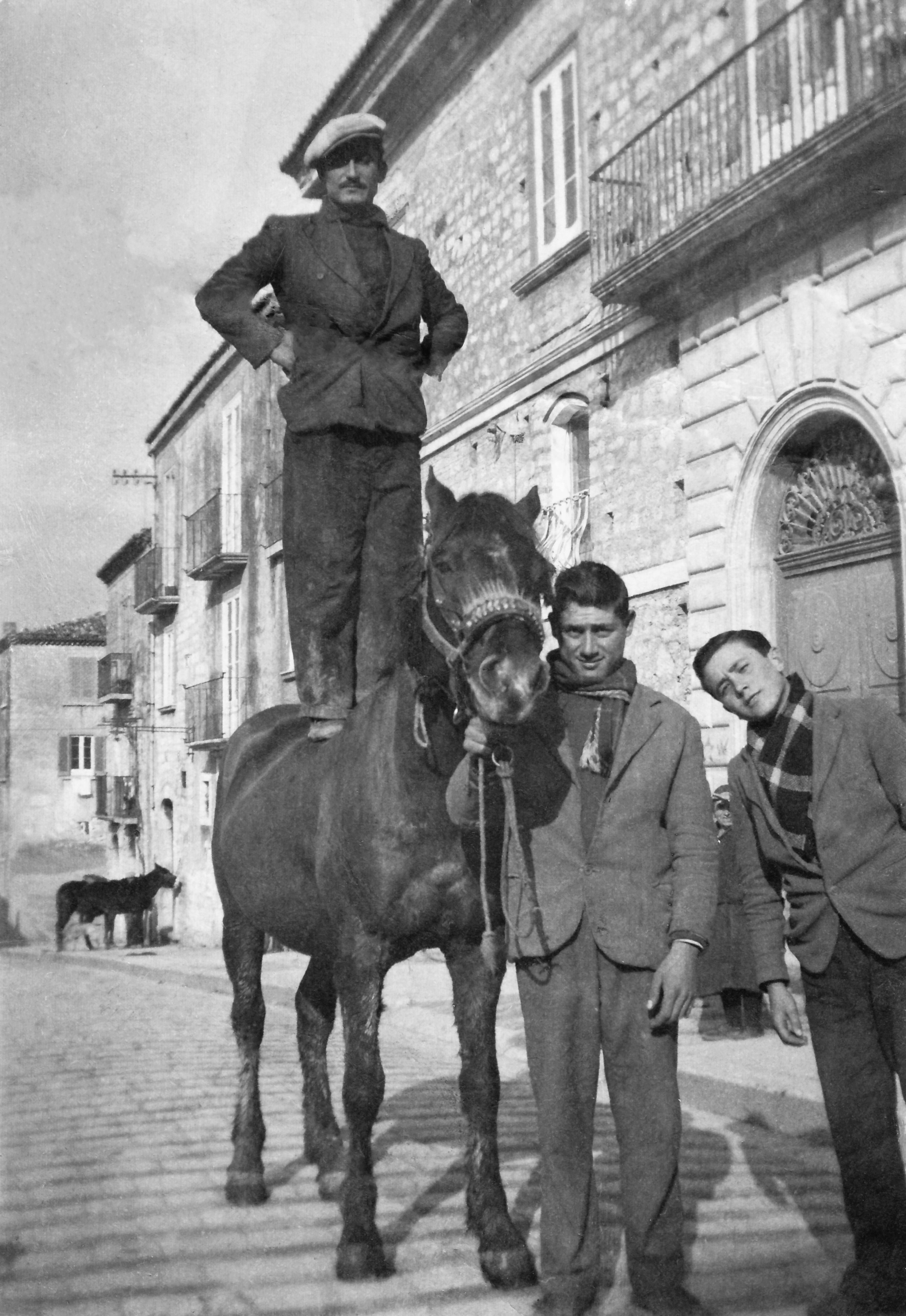 Rom abruzzesi con il loro cavallo si esibiscono in una prodezza 1960 circa.